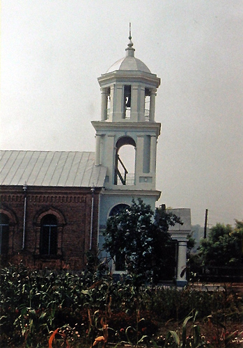 Колокольня старообрядческой Ивановской церкви в селе Старая Некрасовка, 1823 года постройки